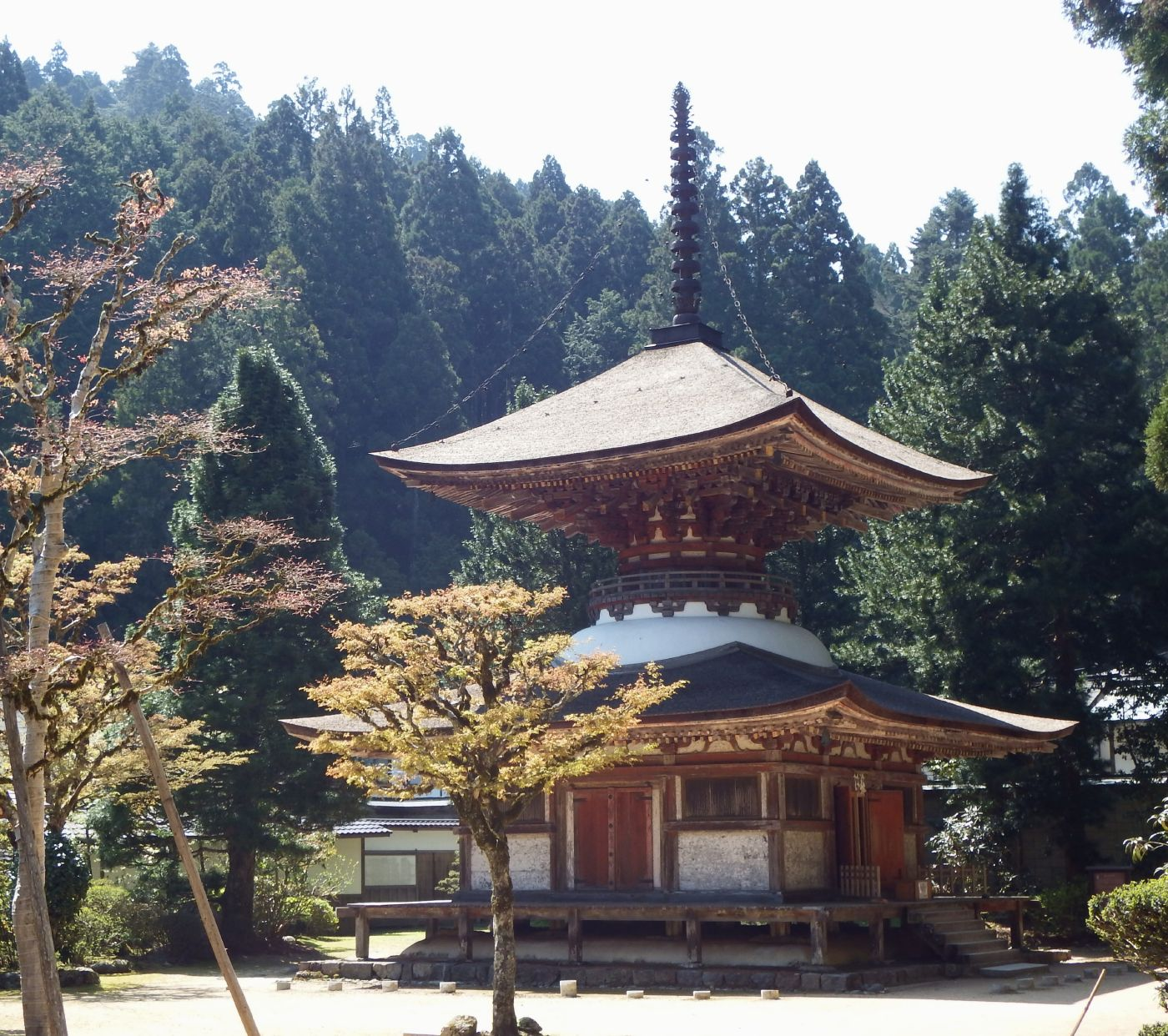 金剛三昧院多宝塔